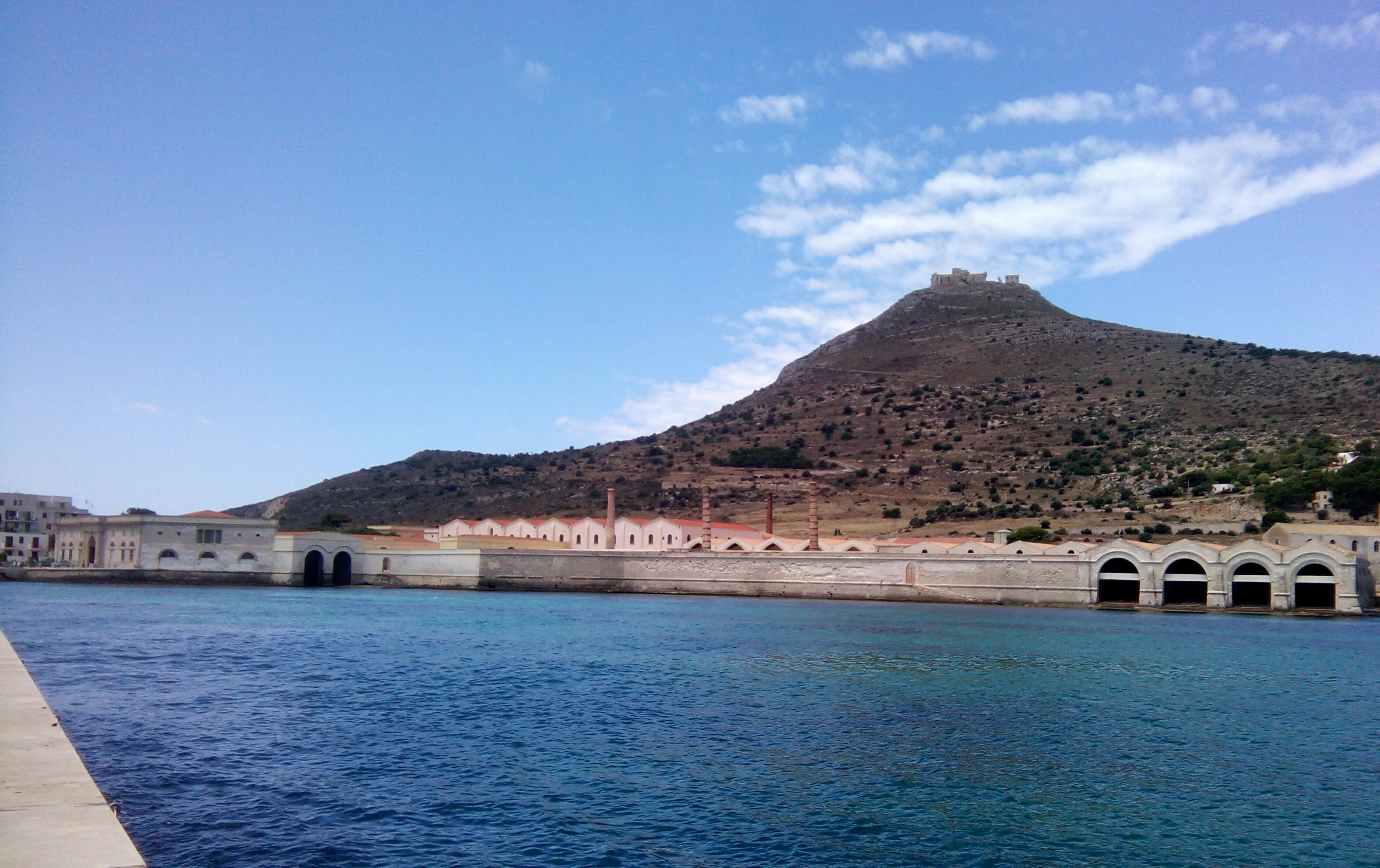 Panorama della tonnara di Favignana (Stabilimento Florio)